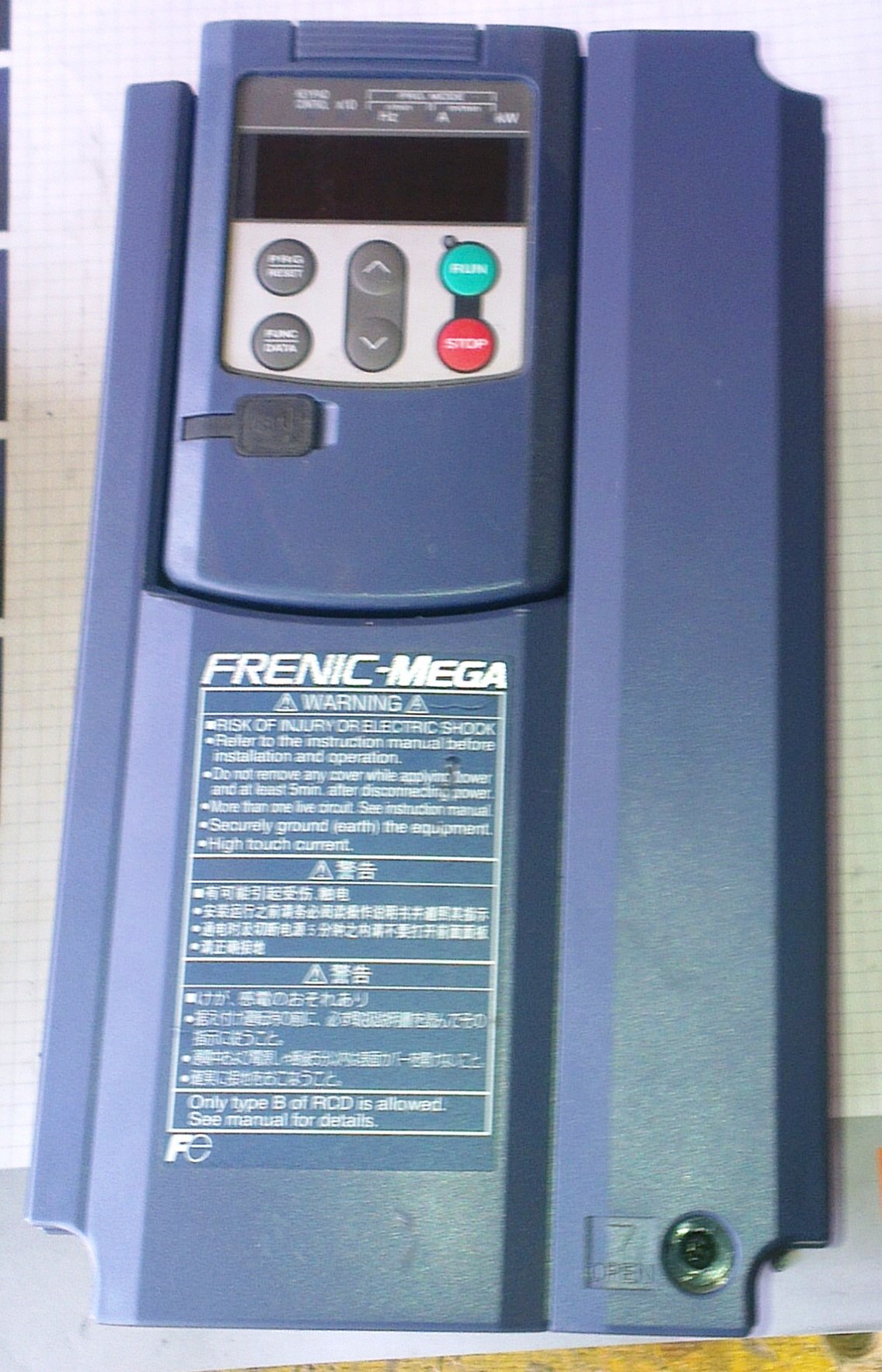 frekvenčni pretvornik znamke fuji tipa frenic mega. Avtor: Ignac Mihevc